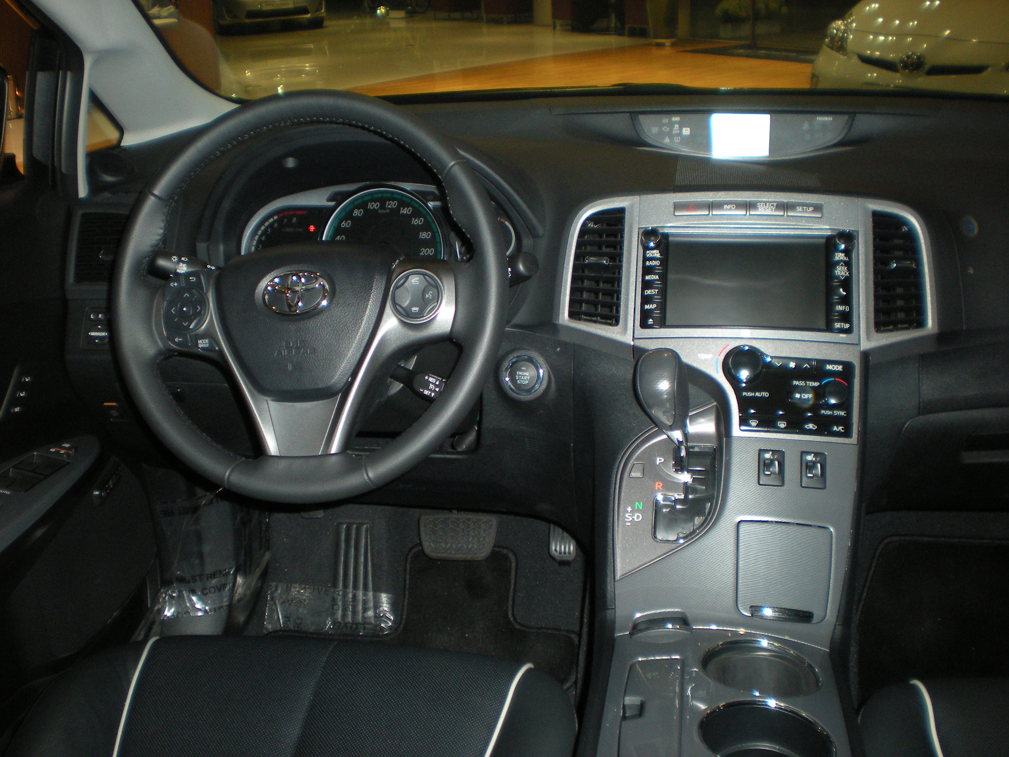 トヨタ・ヴェンザ